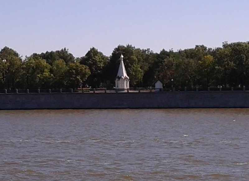 Часовня равноапостольного князя Владимира в Лужниках. Вид с Воробьёвых гор, Москва